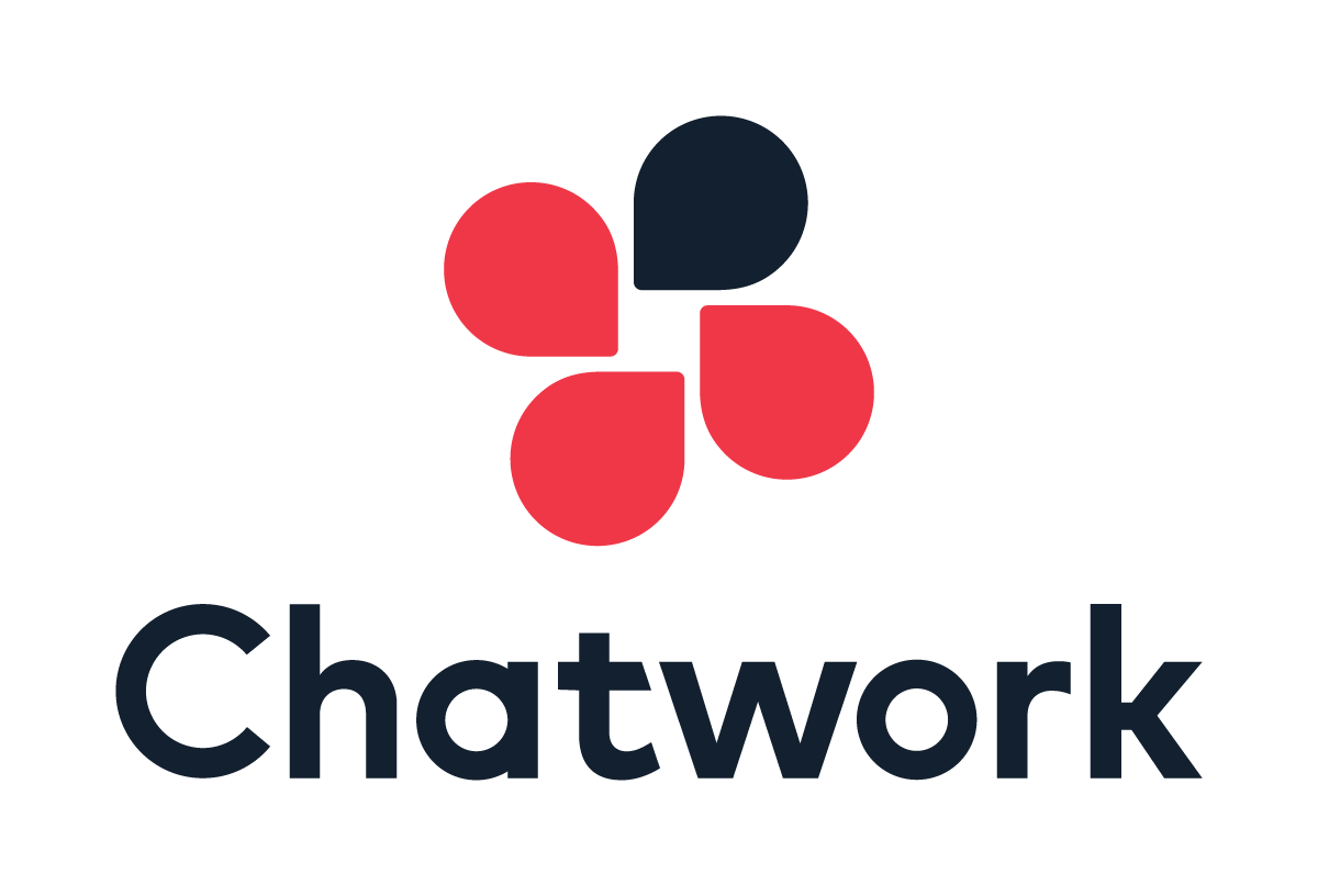 Chatwork株式会社の公式ロゴマーク